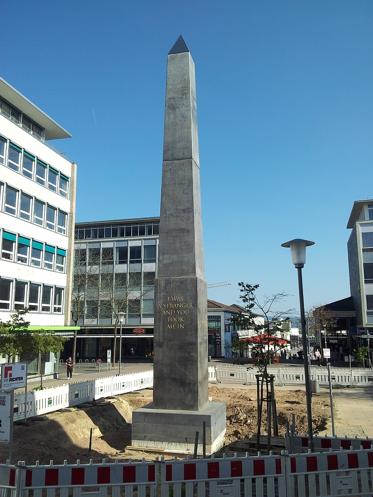 Der Obelisk von Olu Oguibe kurz nach seinem Wiederaufbau auf der Treppentraße neben dem Stadthotel und dem CVM-Haus.